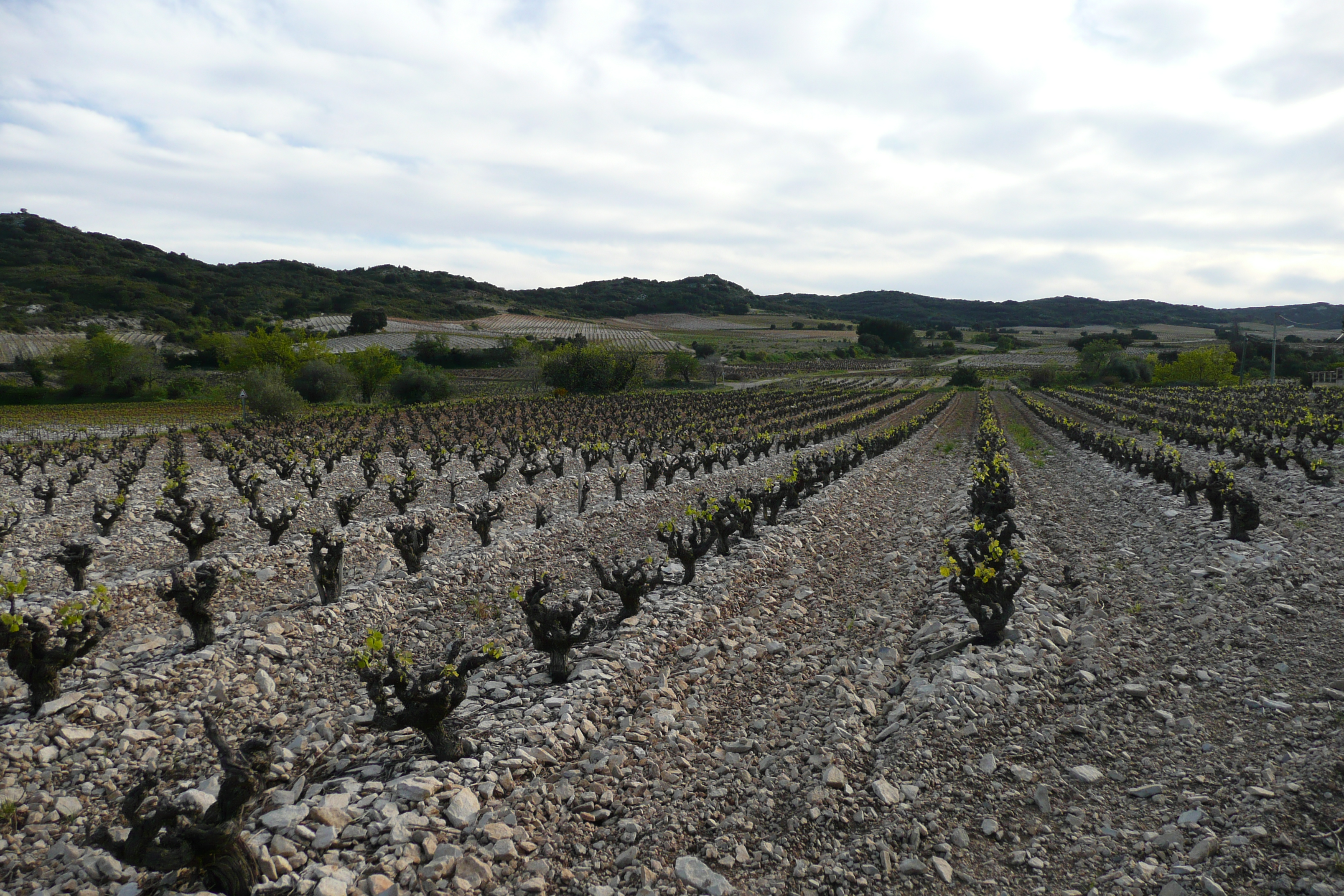 Paysage à Tavel.